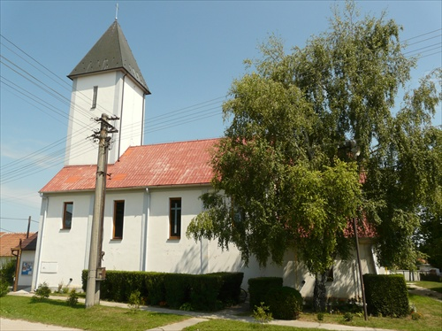 Kostol v dedine Biely Kostol